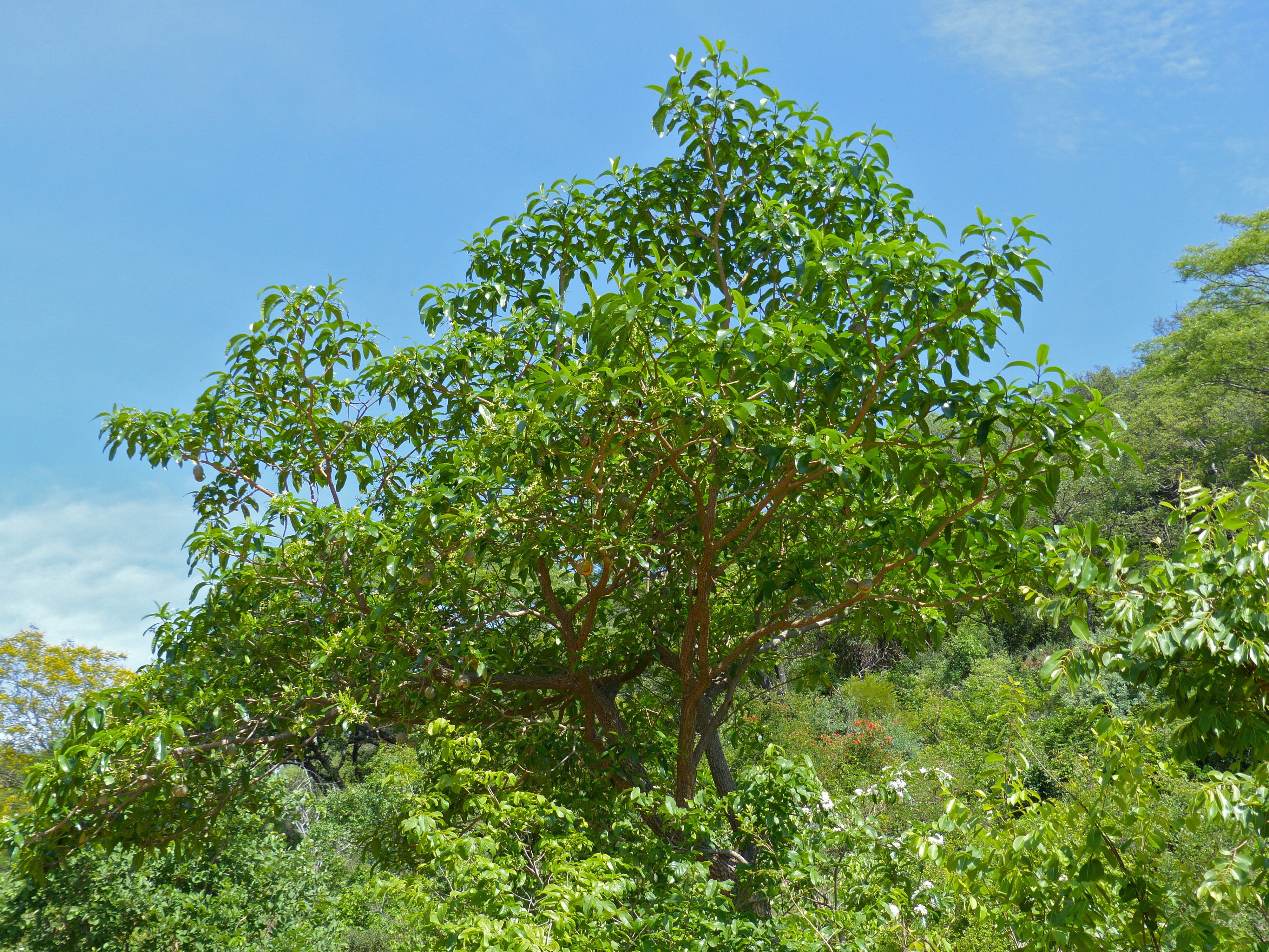 Mahonie Loop near Punda Maria, Kruger NP, SOUTH AFRICA